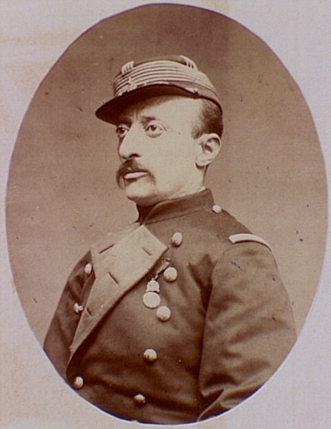 Napoléon La Cécilia (1835-1878)